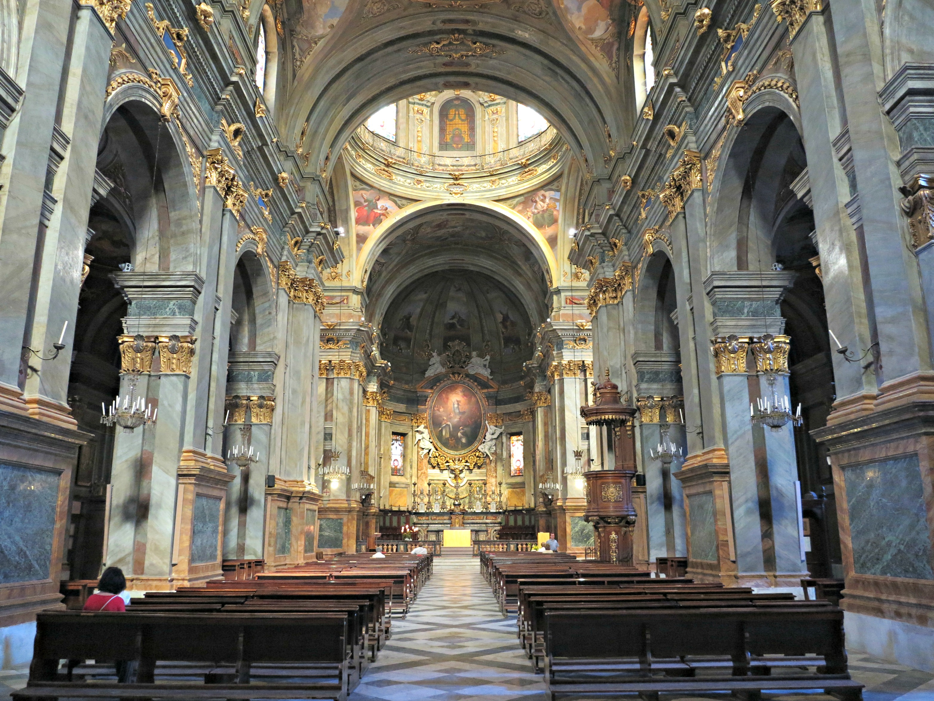 Interno della cattedrale di Fossano